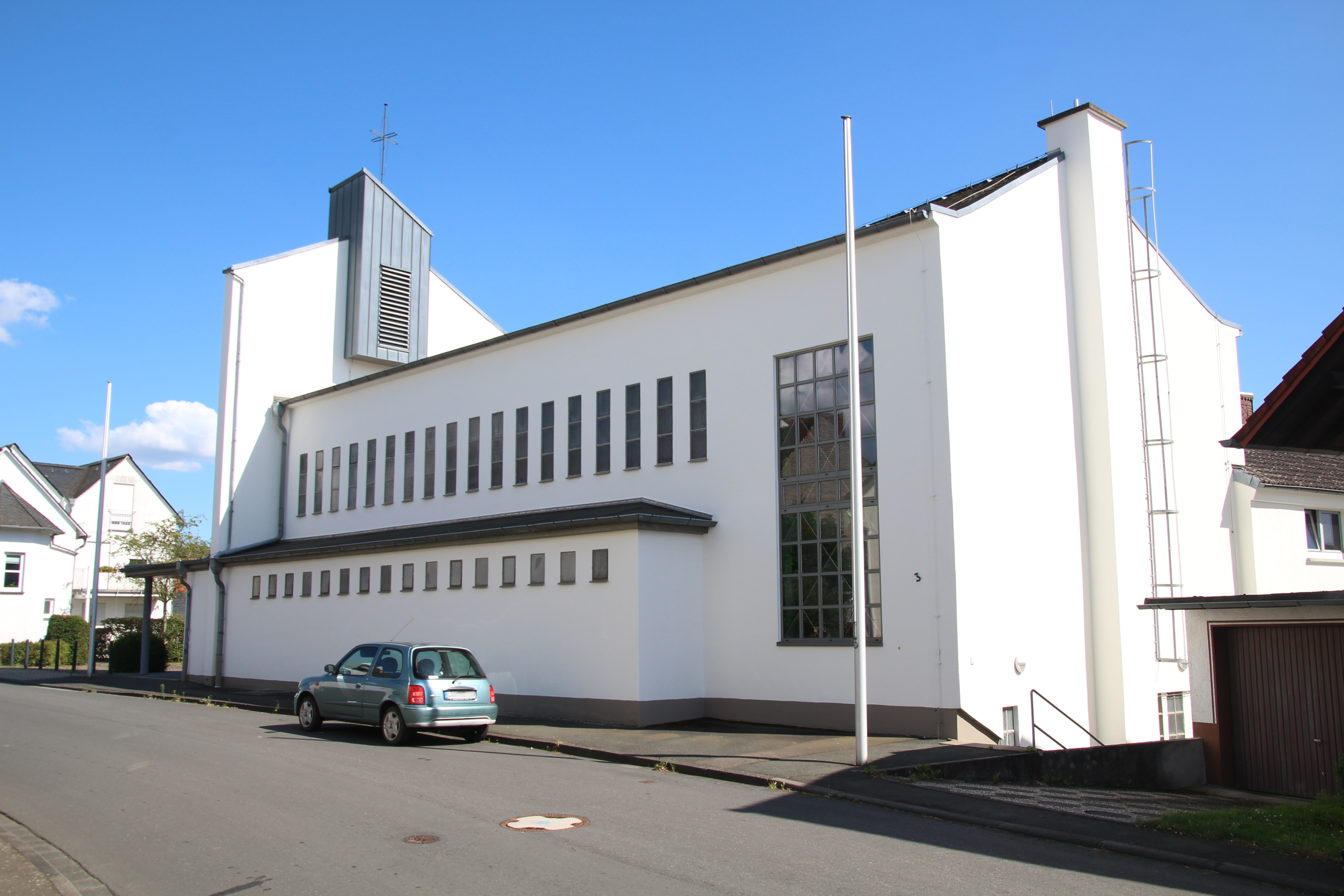 Siehe Foto, Dateiname, Kats u. ggf. Geo-Koords